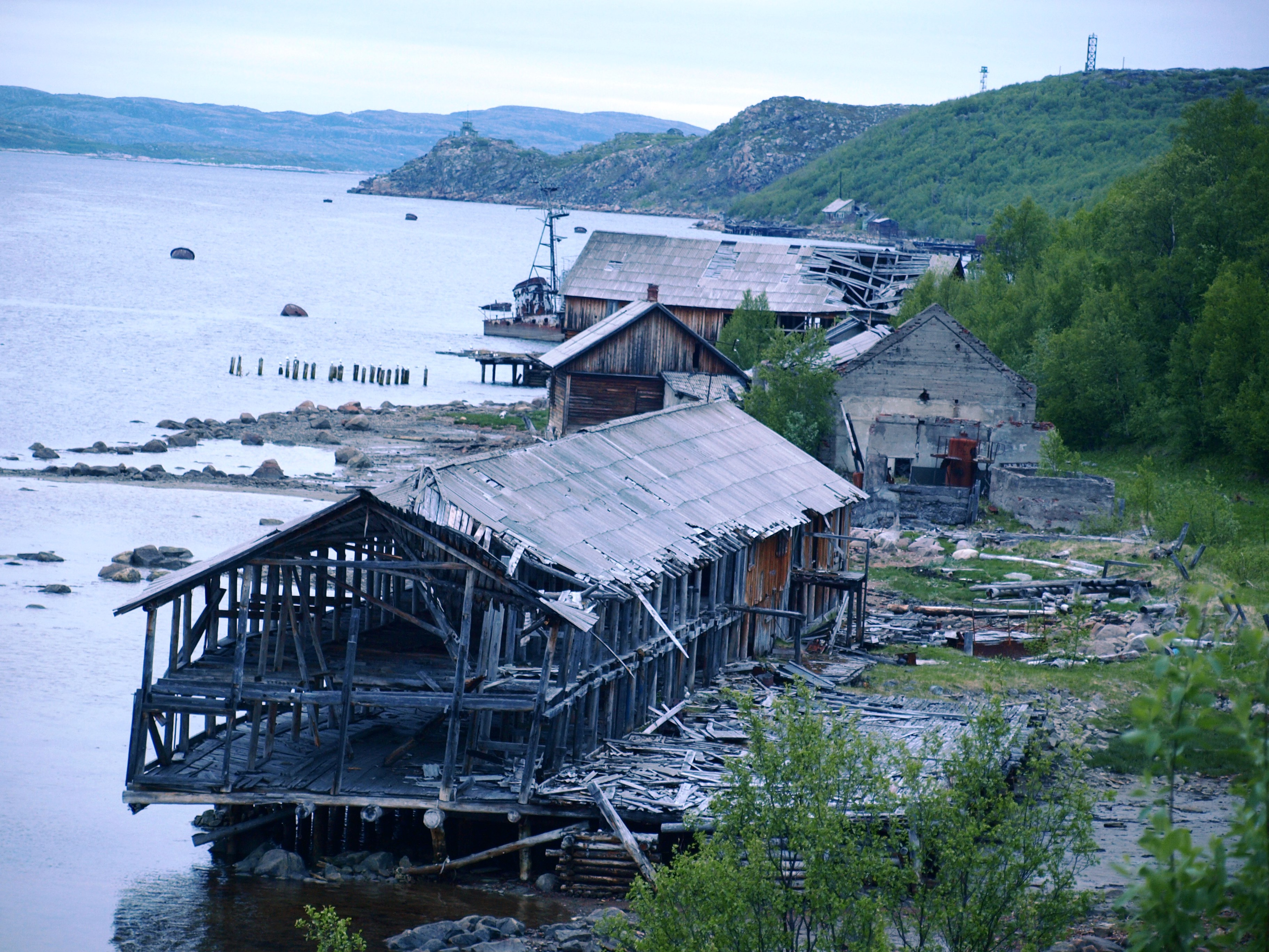 Современная Тюва-Губа